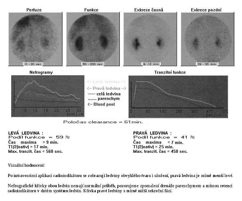 Nefrografické křivky ledvin nemají normální průběh. Pozorujeme zpomalení drenáže parenchymem a mírnou retenci radioindikátoru v dutém systému ledvin.